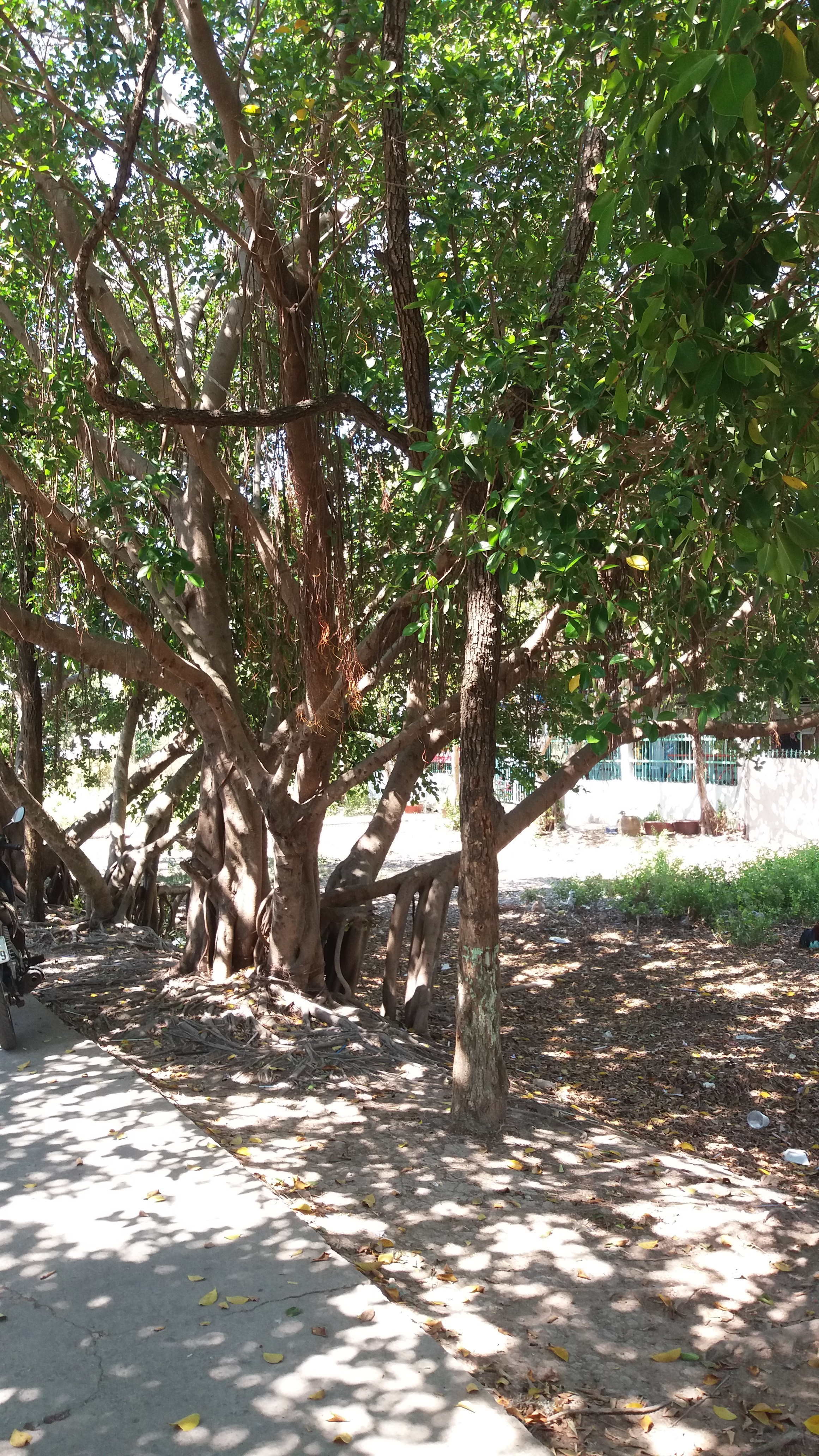 Những cái cây được trồng ở ven đường